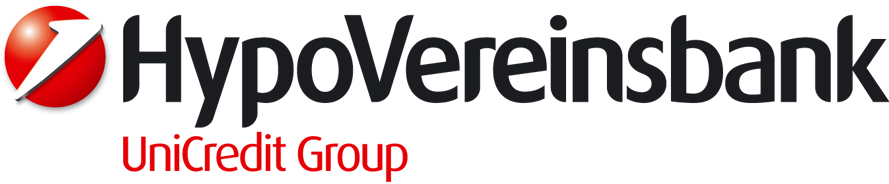 Logo of UniCredit Bank AG until 31 July 2010.